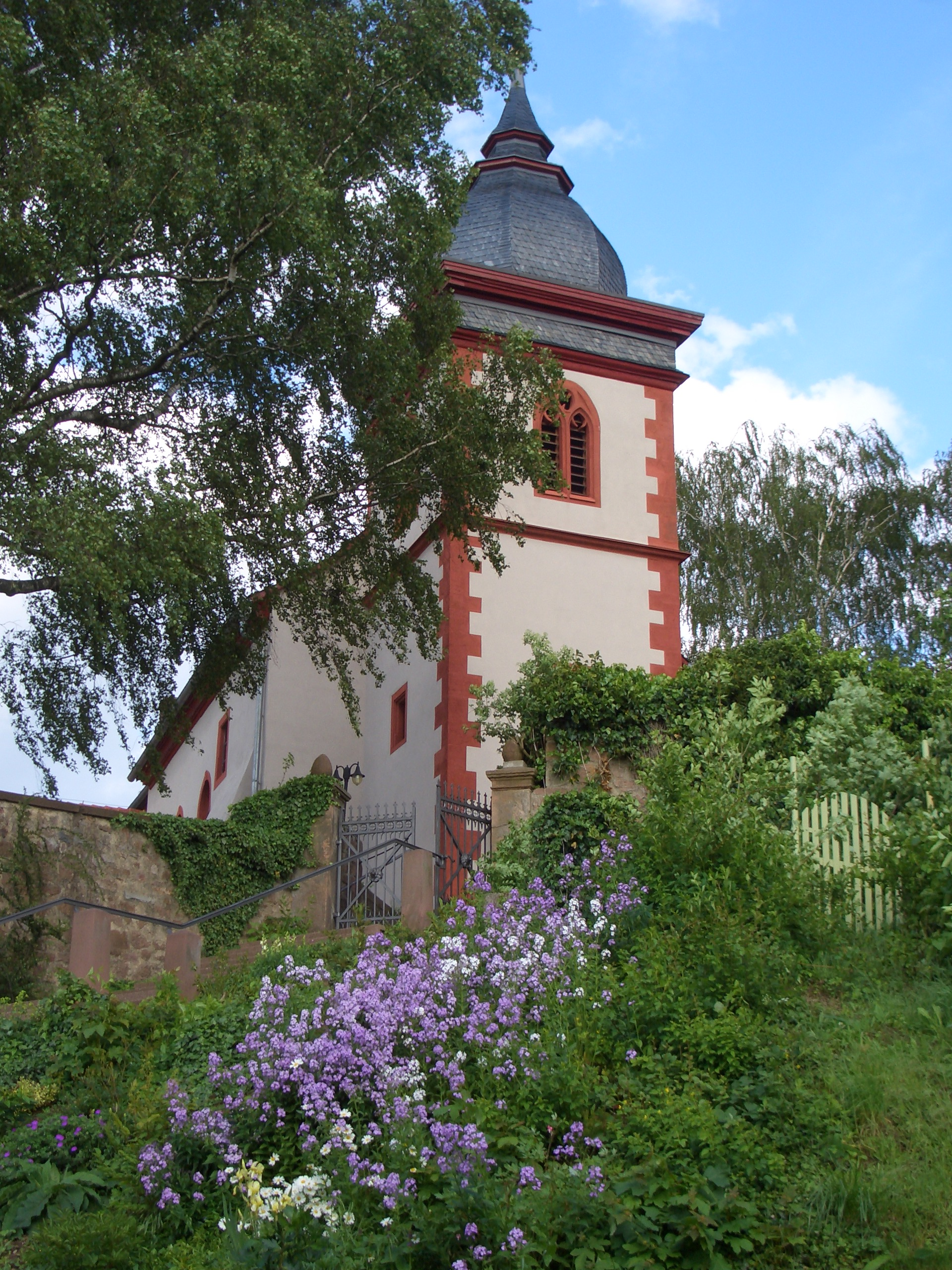 Evangelische Kirche in Ober-Klingen. Selbst Forografiert am 28.05.06